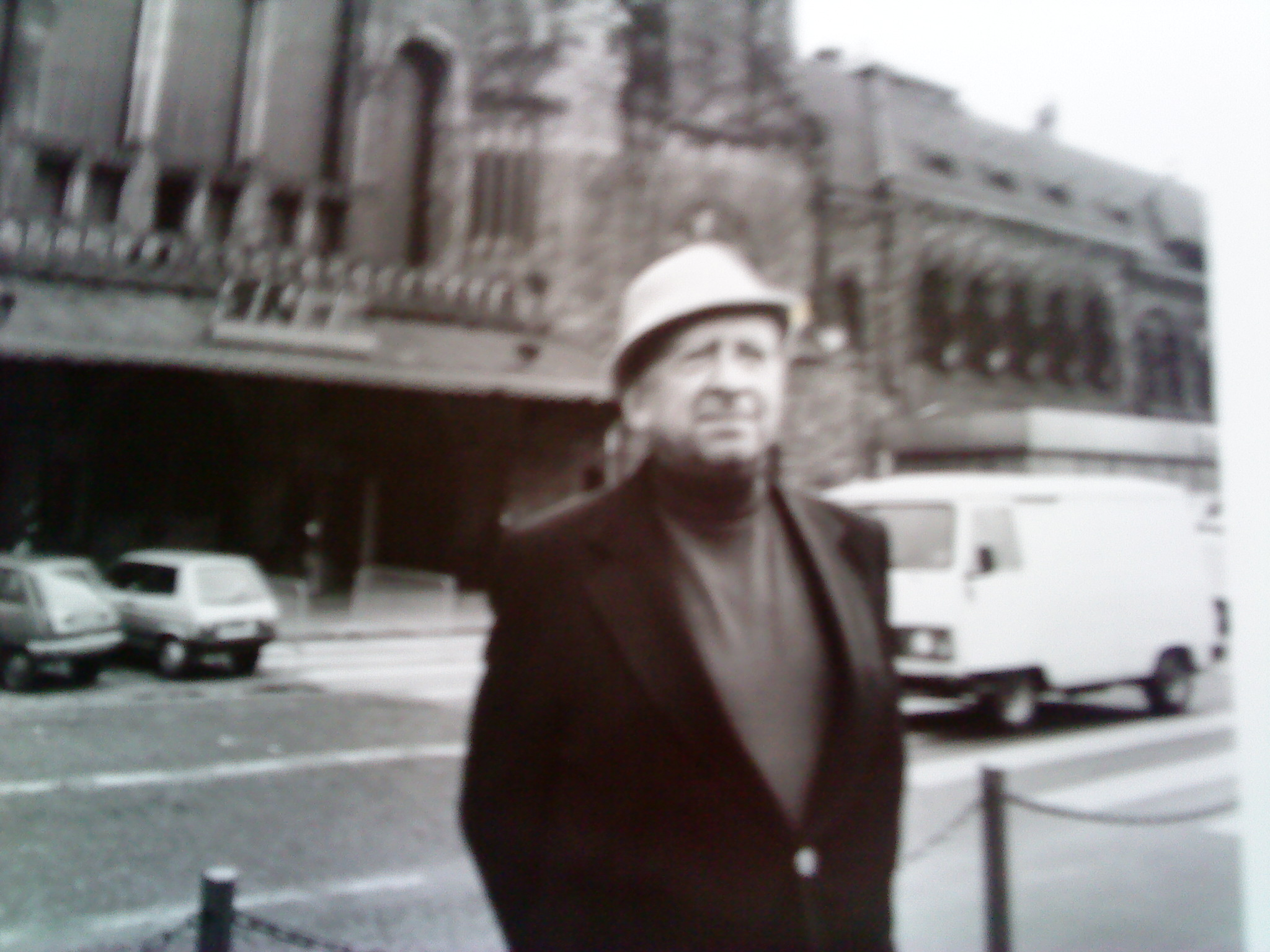 Robert Bloch lors d un voyage en France en Mai 1985 (devant gare SNCF)